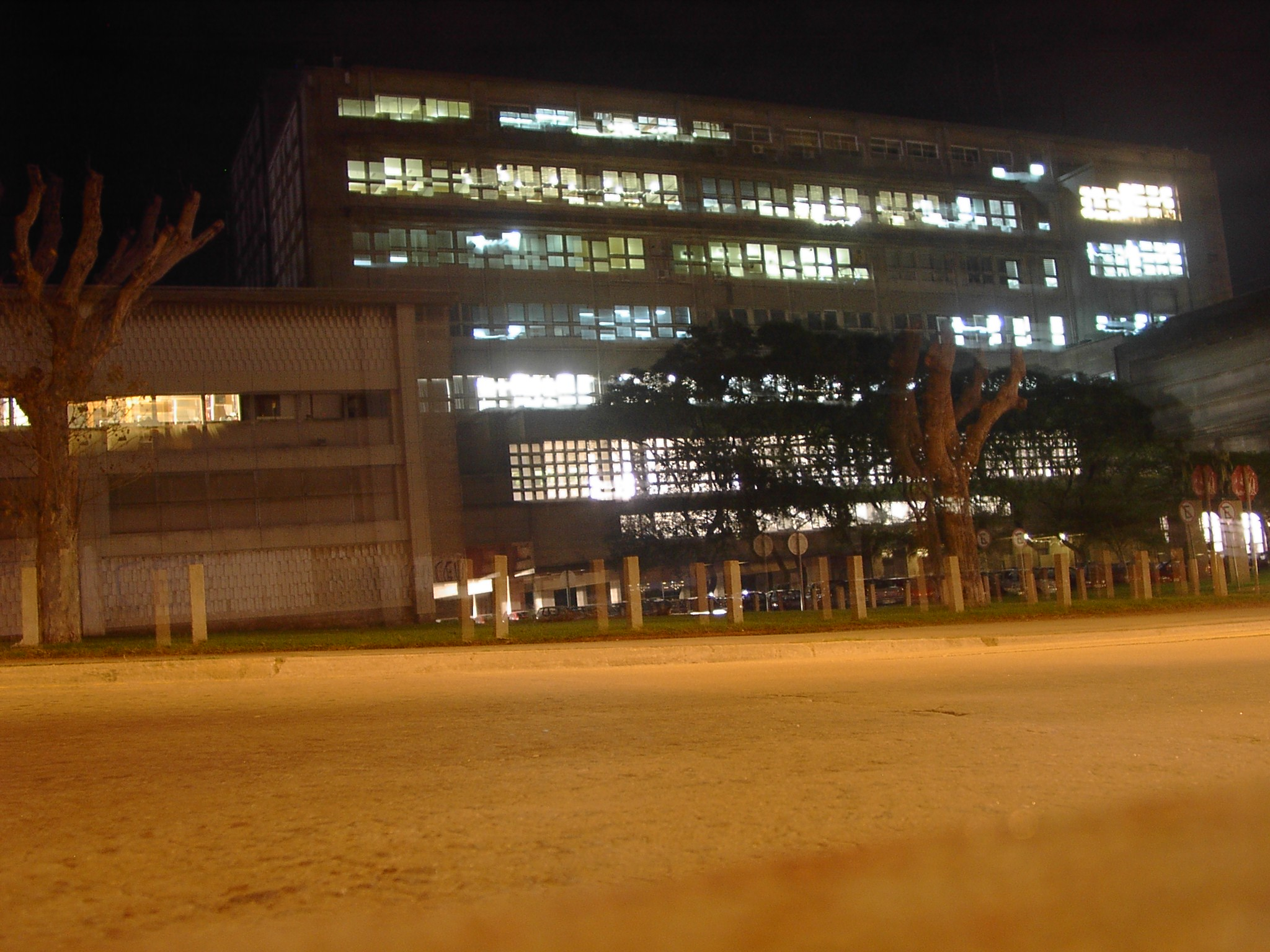 Facultad de Ingeniería (de la República Oriental del Uruguay) por la noche.